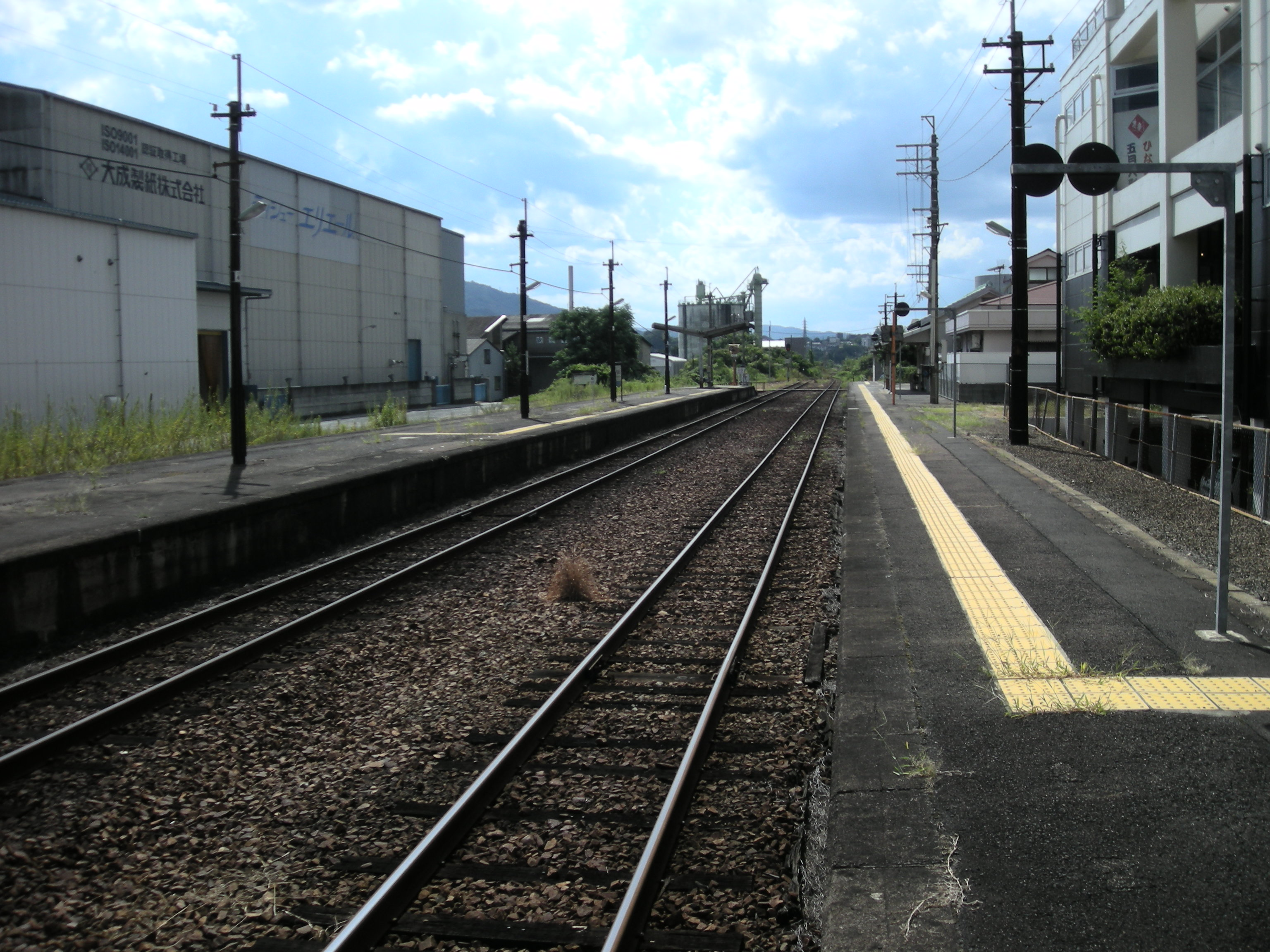 東津山駅構内